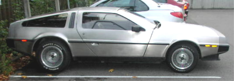 DeLorean DMC12